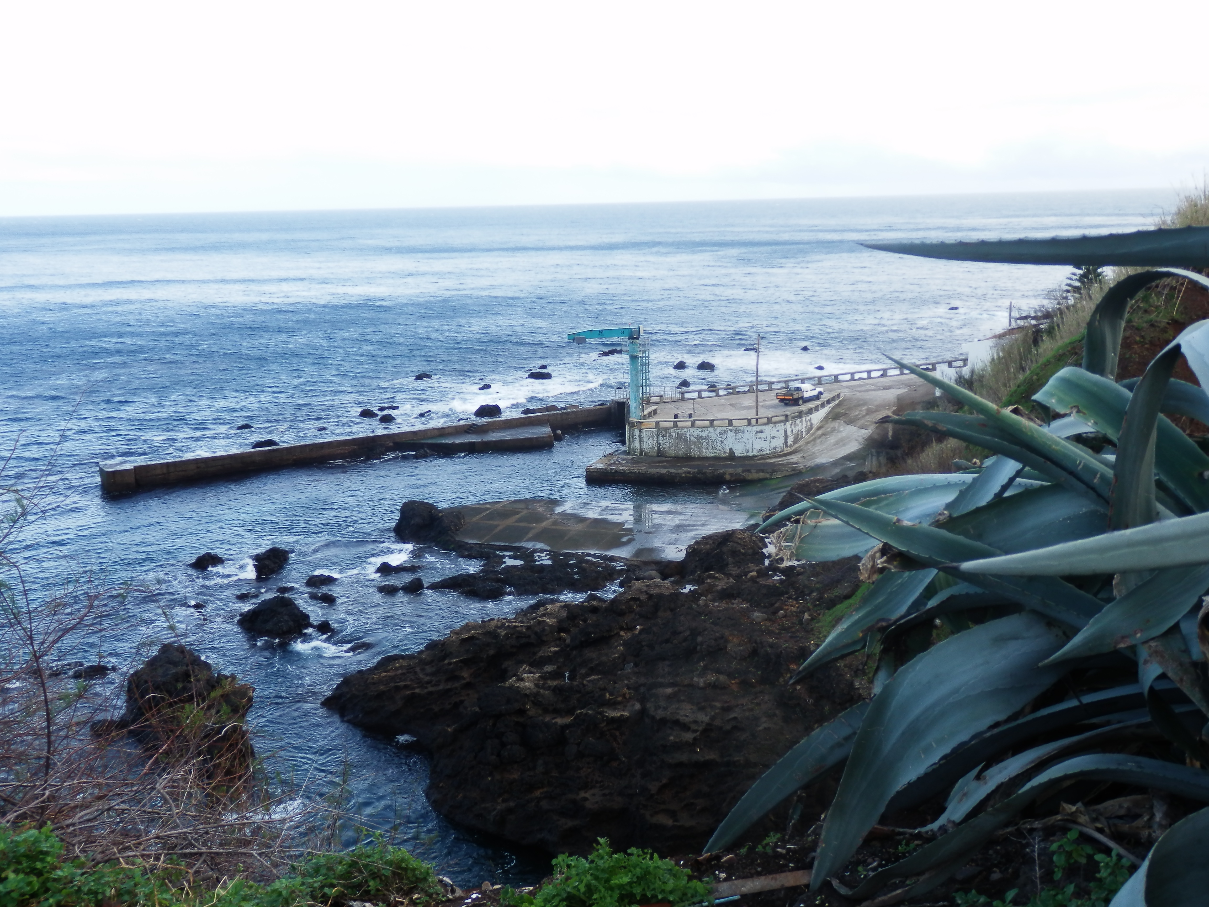 Panoramica do Porto